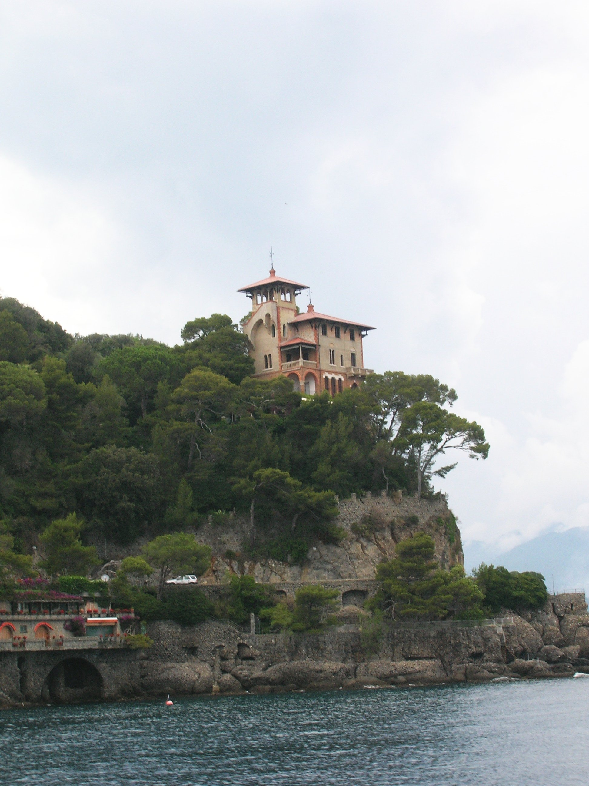 Villa am Hang zu Portofino